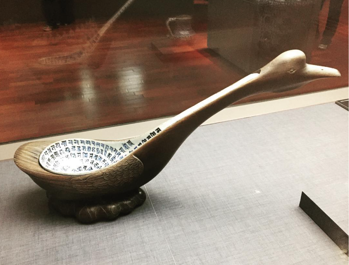 明 永樂 青花朵蓮梵文勺 (故-瓷-016761-N000000000, 國立故宮博物院)